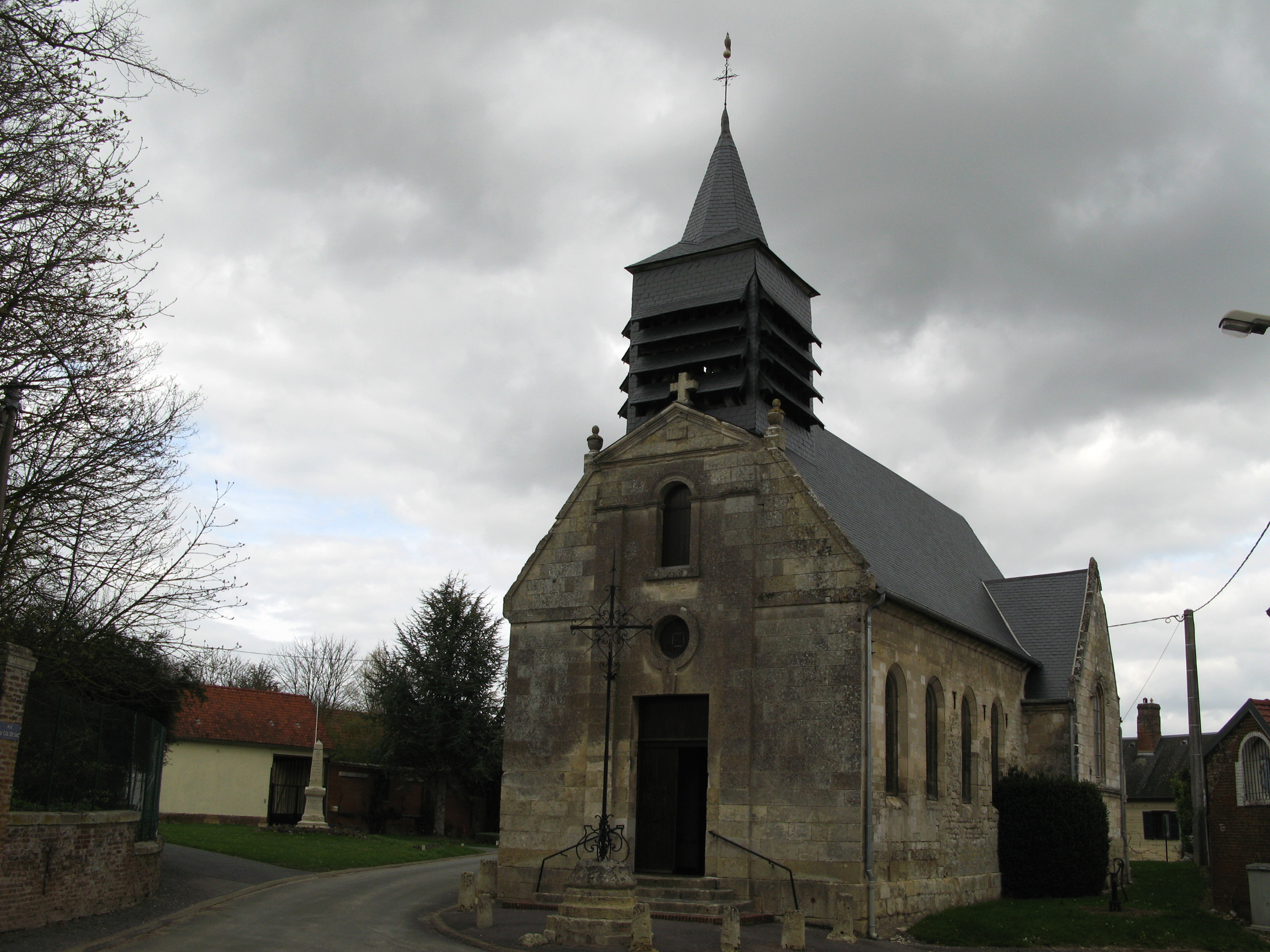 Tartigny (Oise, France) - L'église et le monument-aux-morts. . . .